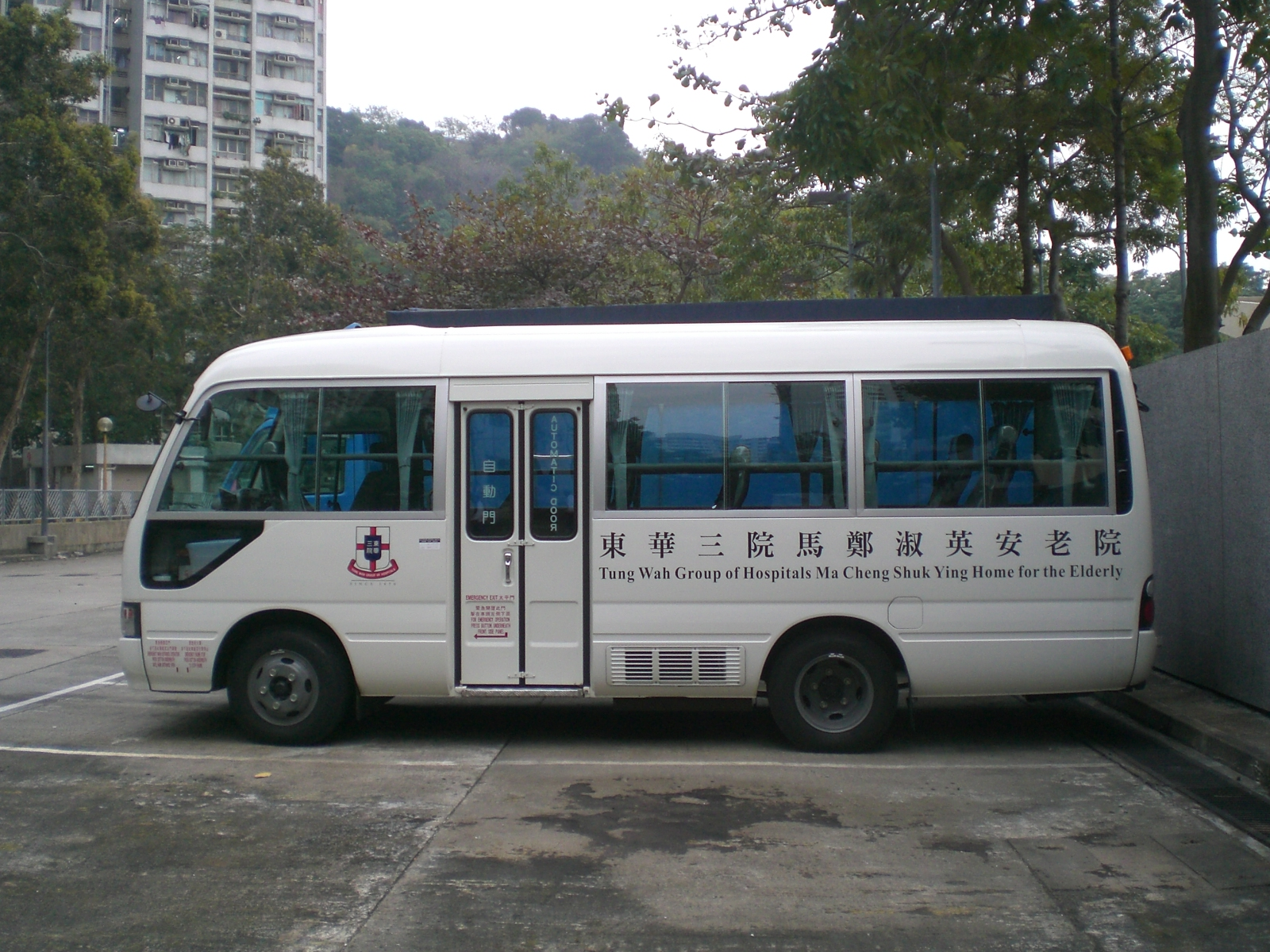 東華三院馬鄭淑英安老院（深水埗，李鄭屋邨）